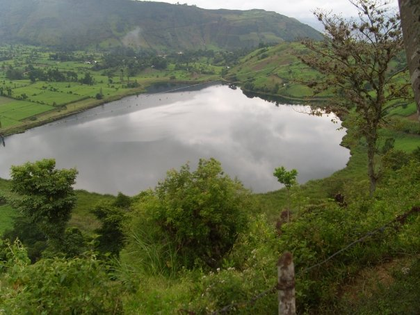 es un sitio maravilloso de santander colombia